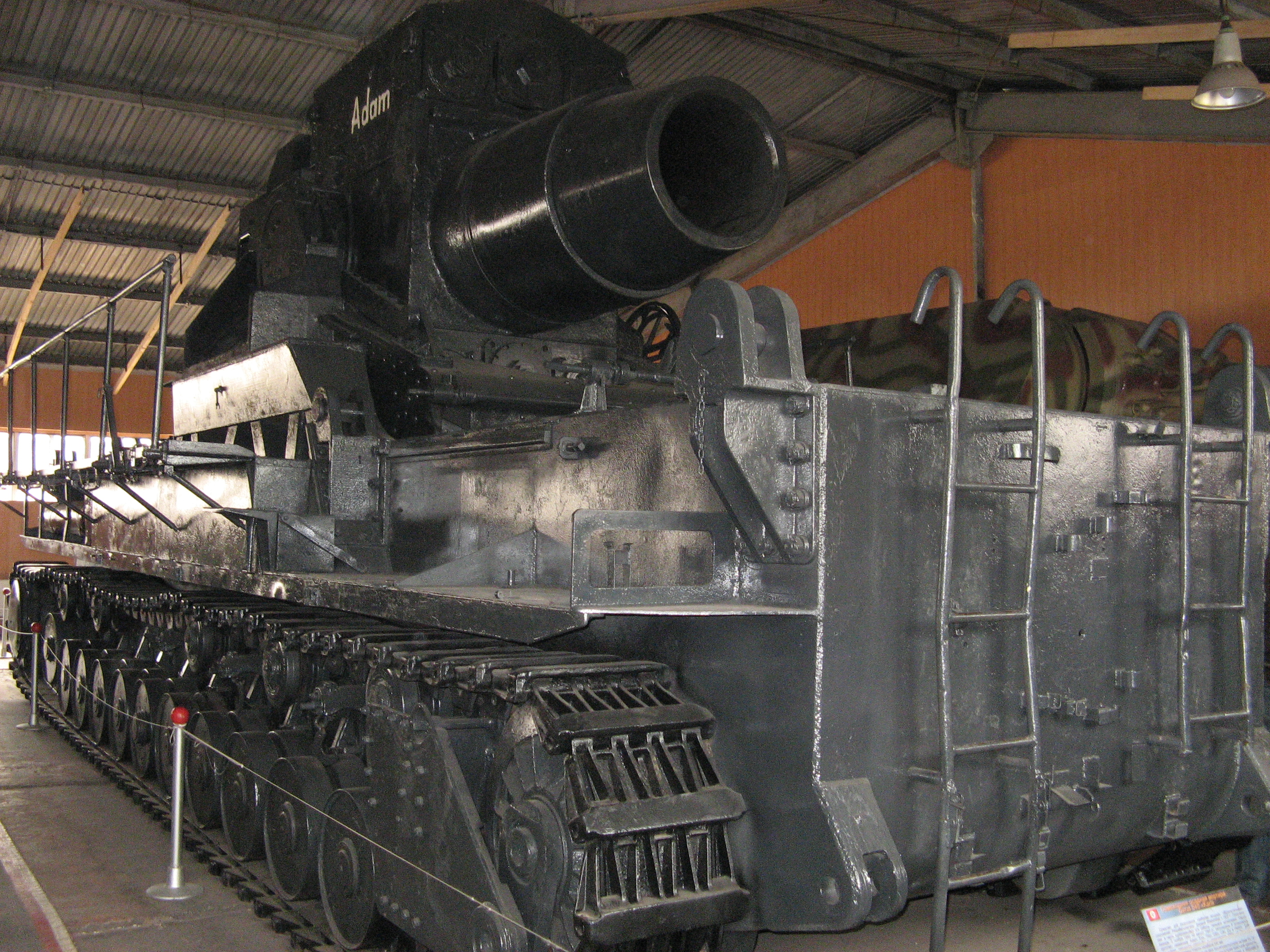 Mörser Karl Adam in tank museum kubinka Russia